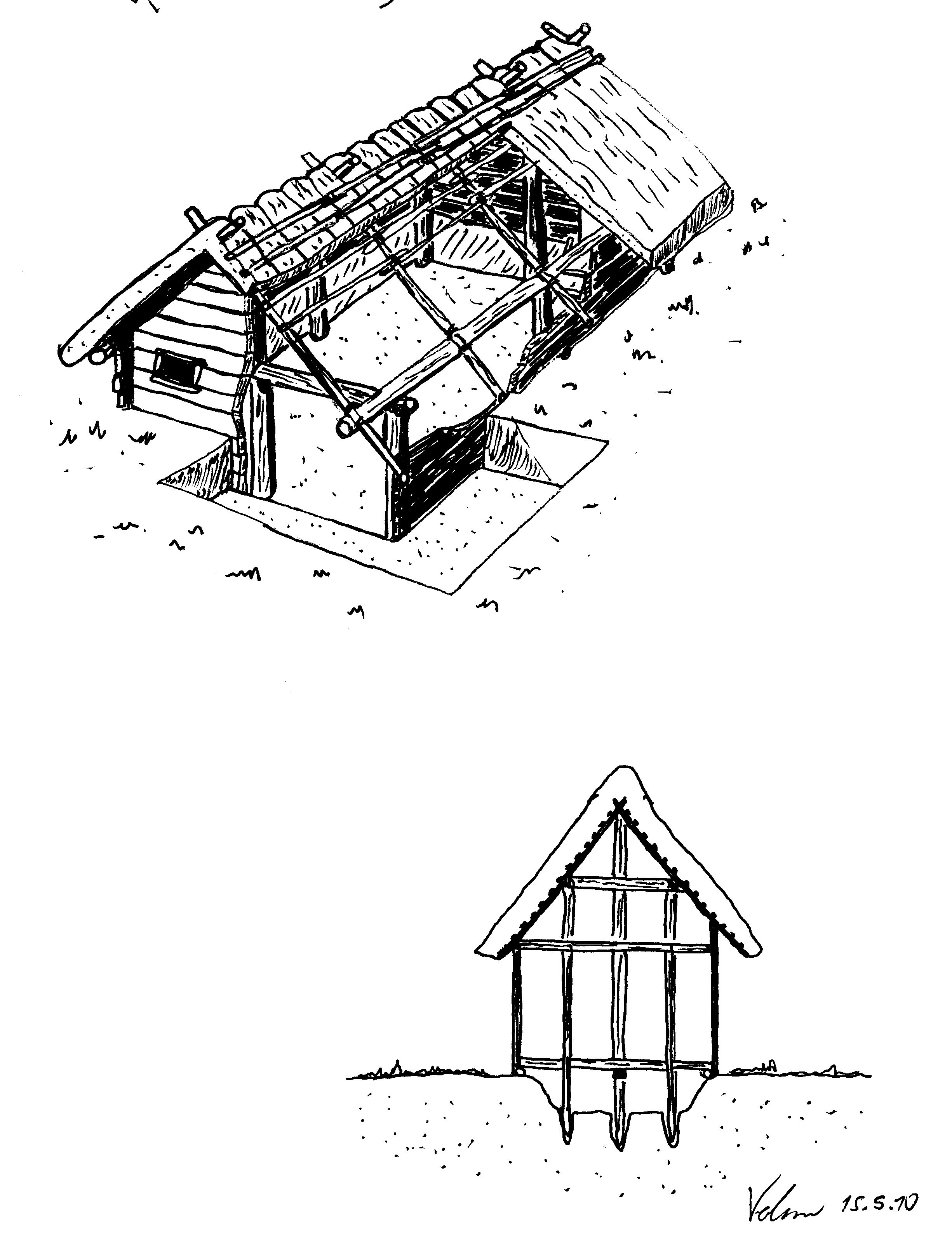 Skizzen Grubenhäuser/Rosstal (D) und Sussex (GB)